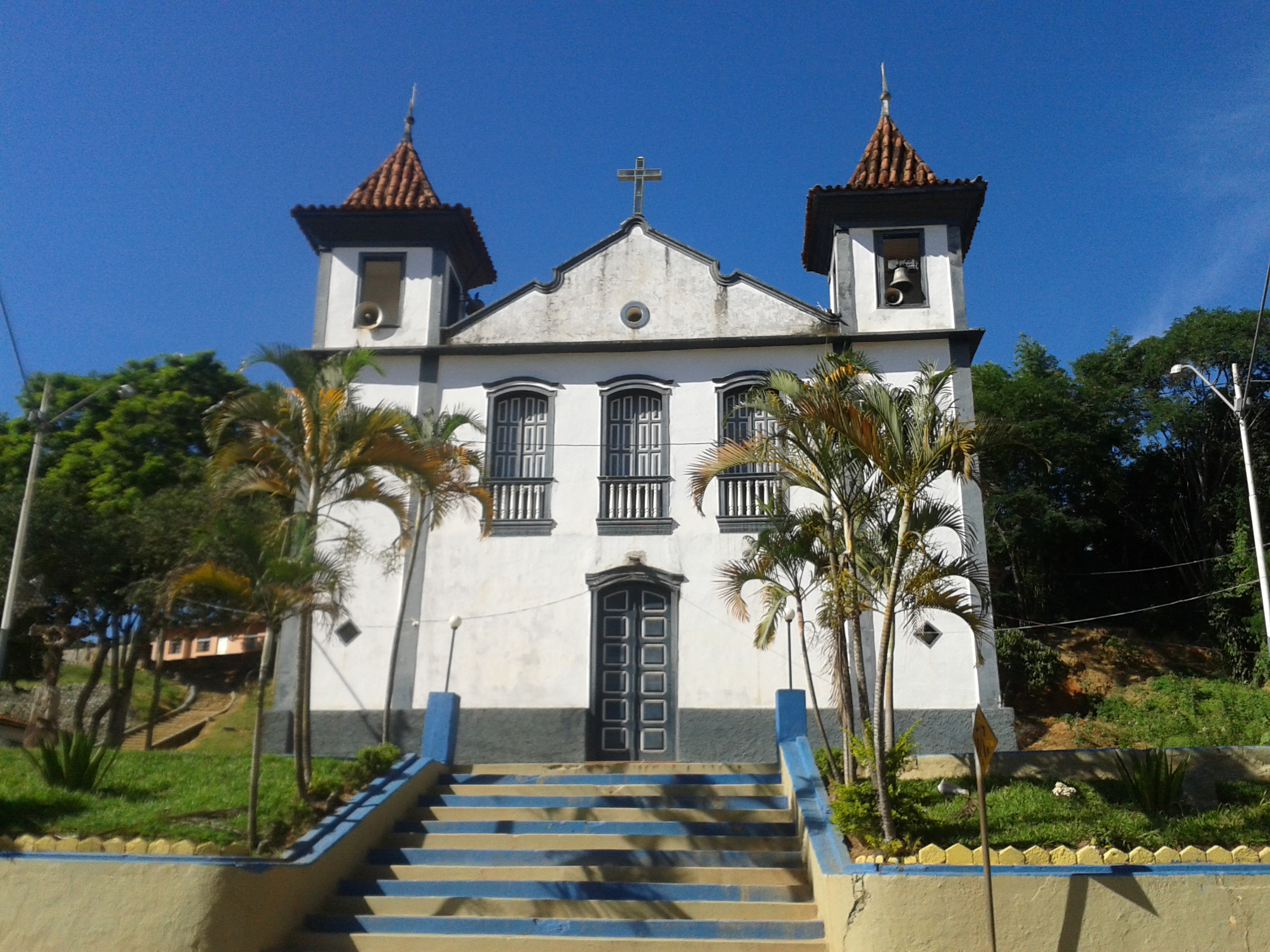 Foto da Matriz Nossa Senhora da Conceição no distrito de Ipoema, Itabira-MG